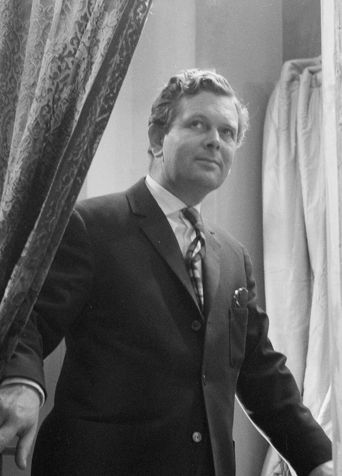 Televisiespel "Een engeltje in de Lommerd" , Willy Van Hemert